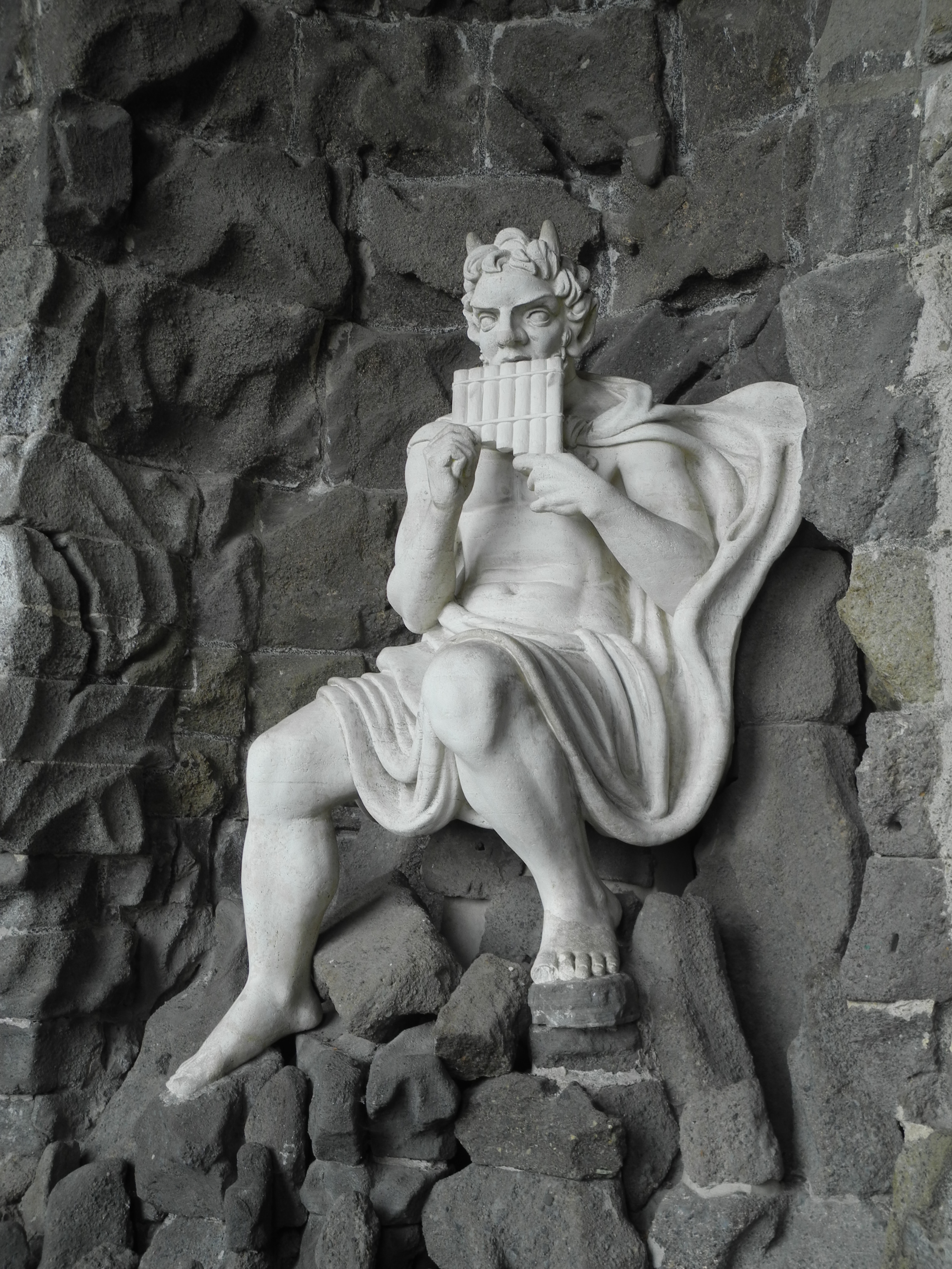 Die Vexierwassergrotte des Herkules im Bergpark Wilhelmshöhe in Kassel, Hessen, Deutschland. Figur des Pan.